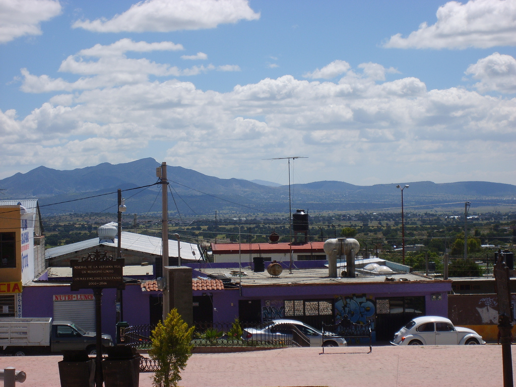 Pueblo - pueblo, pero alberga uno de los restaurantes más famosos y caros de los alrededores de Pachuca